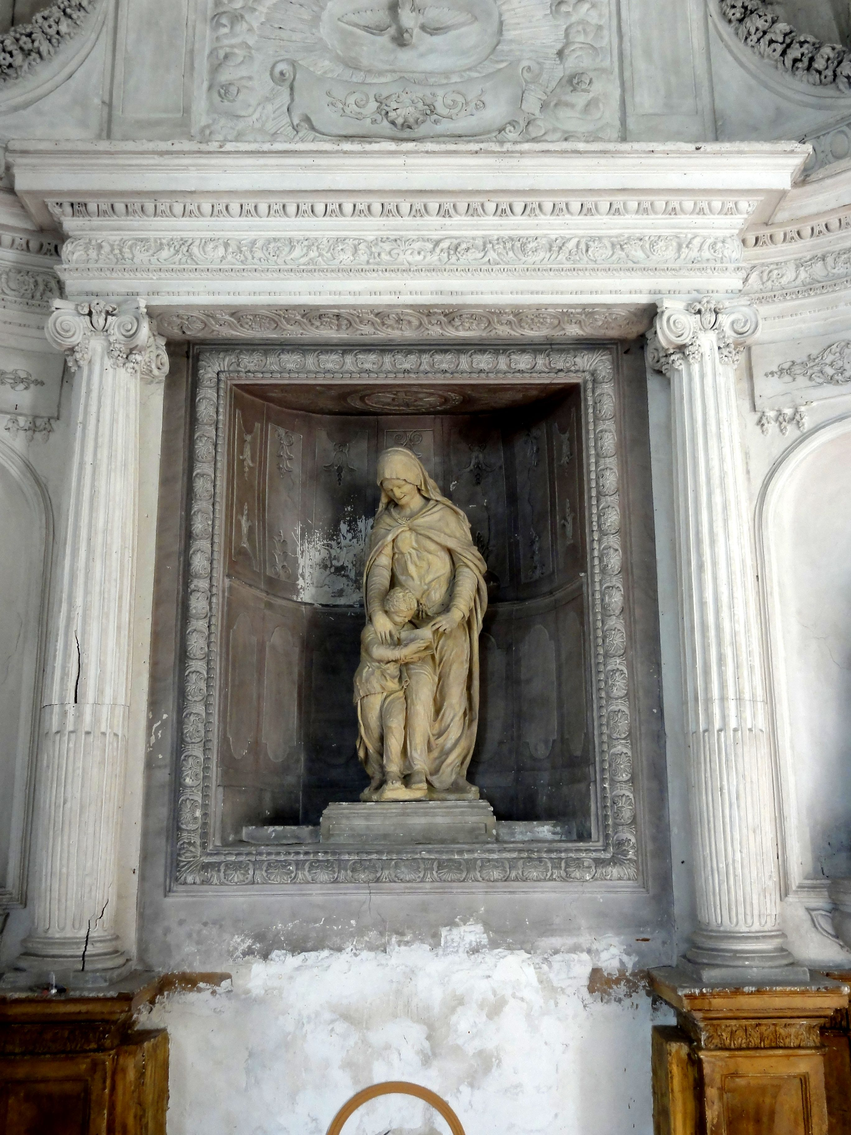 Bas-côté sud, 2e chapelle, autel de Sainte Anne, 1672.